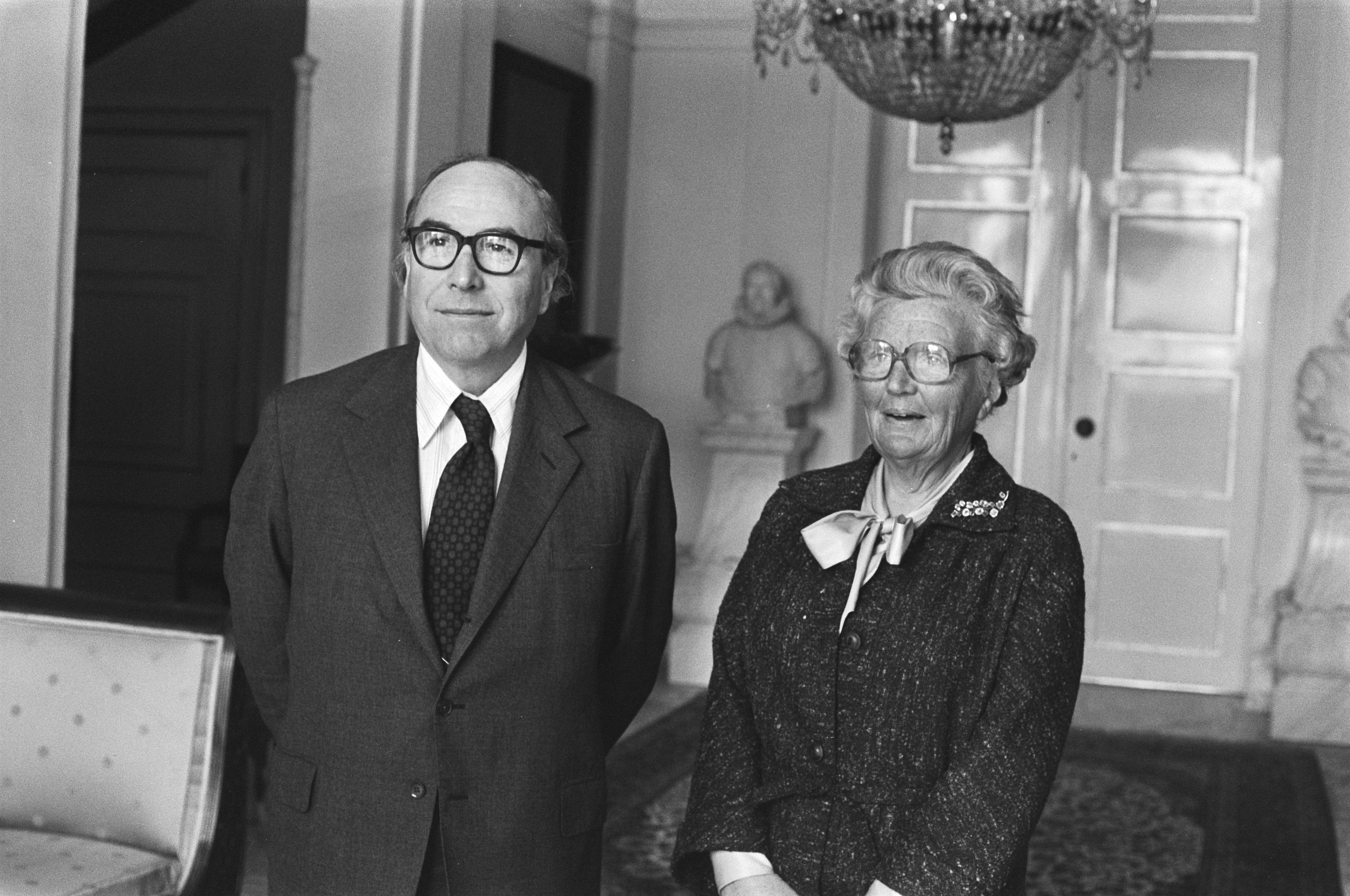 Collectie / Archief : Fotocollectie Anefo Reportage / Serie : Koningin Juliana ontvangt Roy Jenkins (voorzitter Europese Commissie) op Paleis Soestdijk Beschrijving : koningin Juliana en Roy Jenkins Datum : 22 maart 1977 Locatie : Den Haag, Zuid-Holland Trefwoorden : bezoeken, koninginnen, voorzitters Persoonsnaam : Jenkins, Roy, Juliana (koningin Nederland) Instellingsnaam : Paleis Soestdijk Fotograaf : Verhoeff, Bert / Anefo Auteursrechthebbende : Nationaal Archief Materiaalsoort : Negatief (zwart/wit) Nummer archiefinventaris : bekijk toegang 2.24.01.05 Bestanddeelnummer : 929-0833